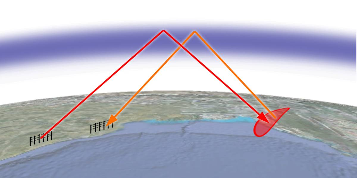 Prnzip der Ausbreitung der elektromagnetischen Wellen bei OTH-B